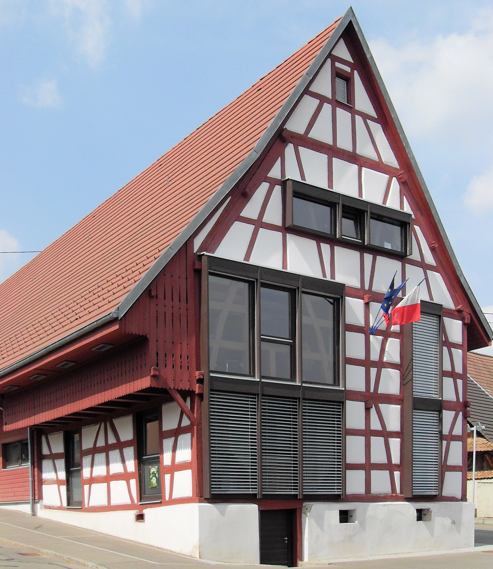 La mairie de Ranspach-le-Haut